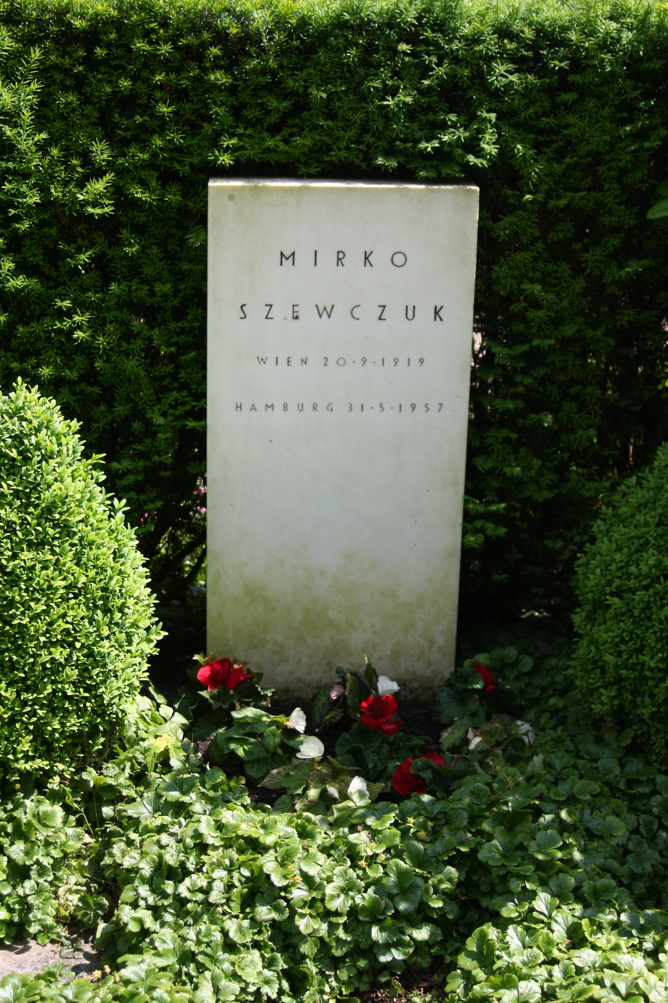 Grab von Mirko Szewczuk auf dem Nienstedtener Friedhof in Hamburg